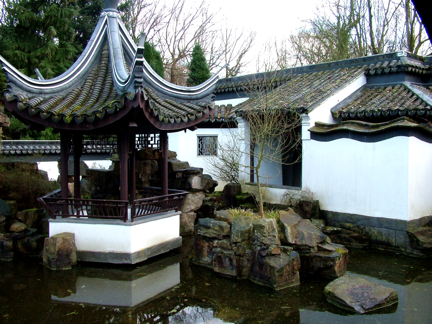 Chinesischer Garten, Ruhr-Universität Bochum